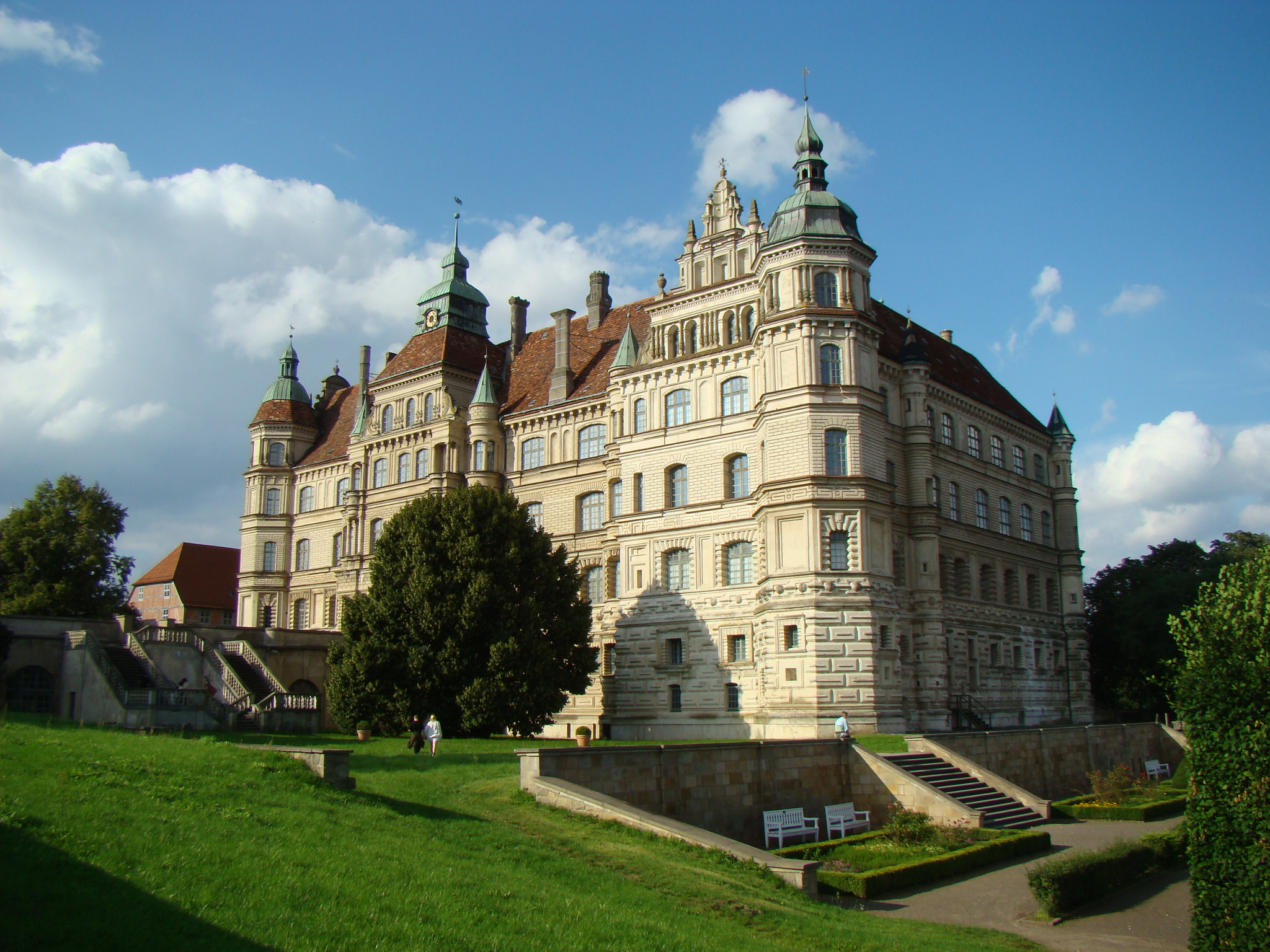 Schloss Güstrow. Foto: Peter Schmelzle, August 2011